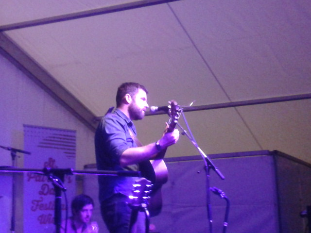 Mick Flannery am 15.3.2013 in Wien, anlässlich des St.Patrick's Days.